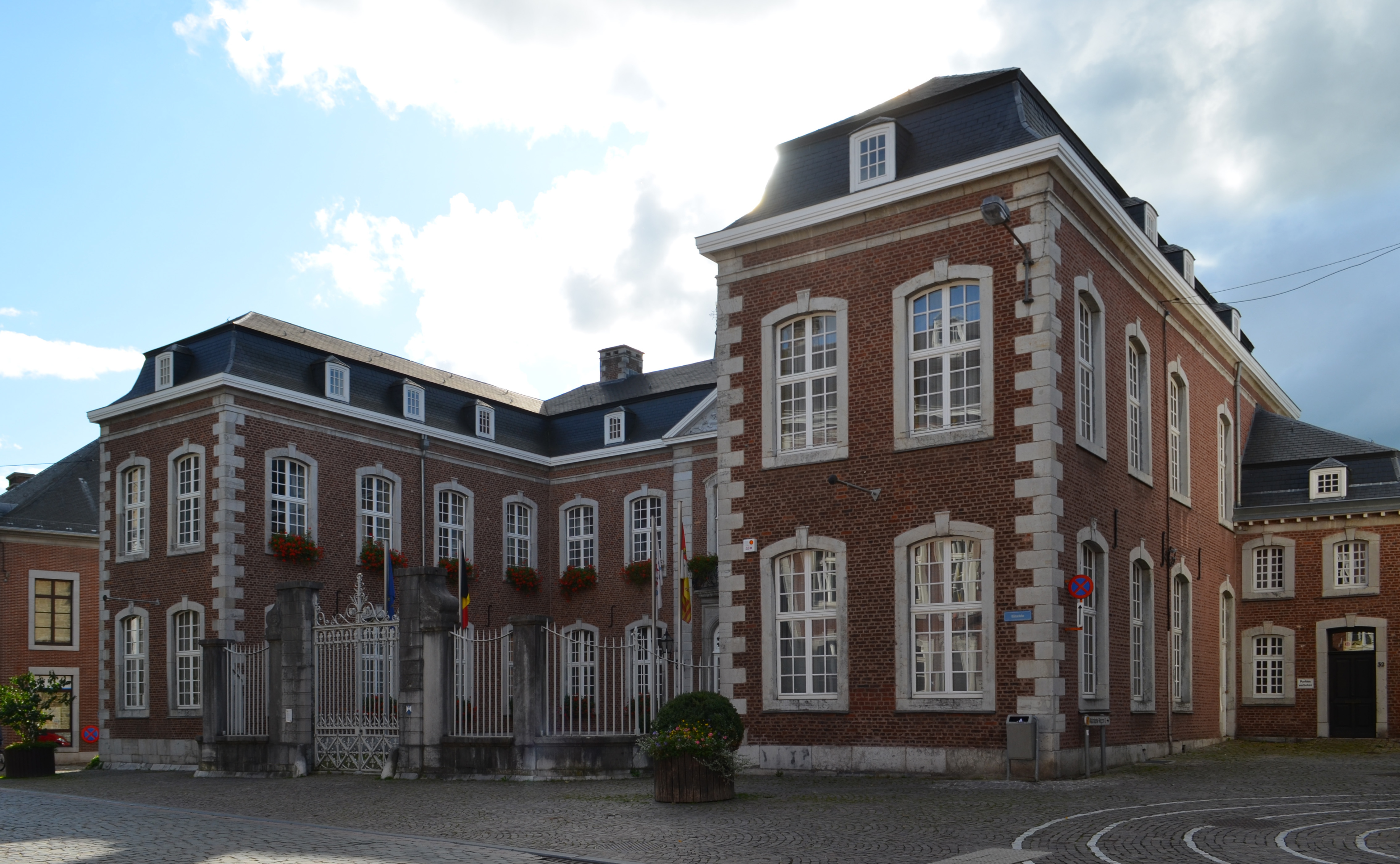 Haus Grandy Ry in Eupen